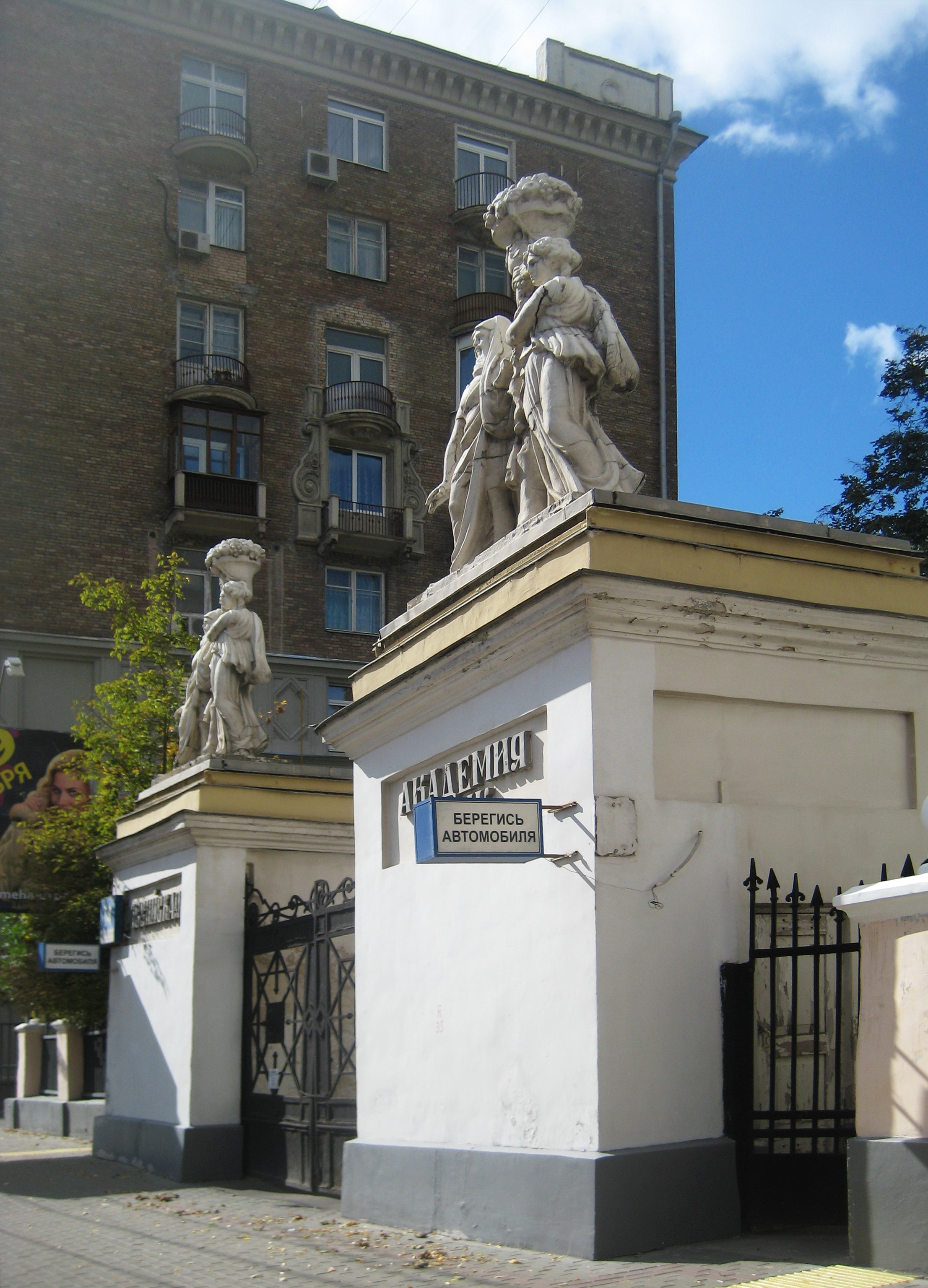 Ленинский проспект